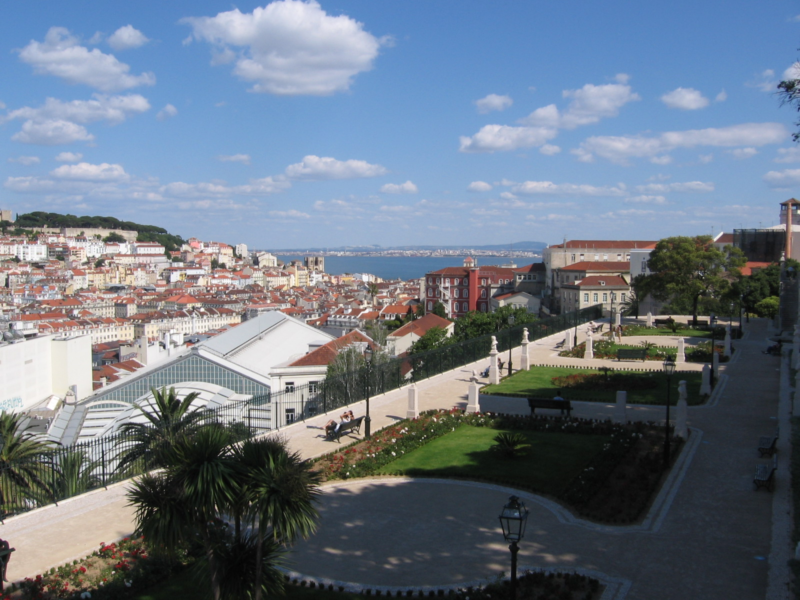 Miradouro de São Pedro de Alcântara, Lisboa, Portugal